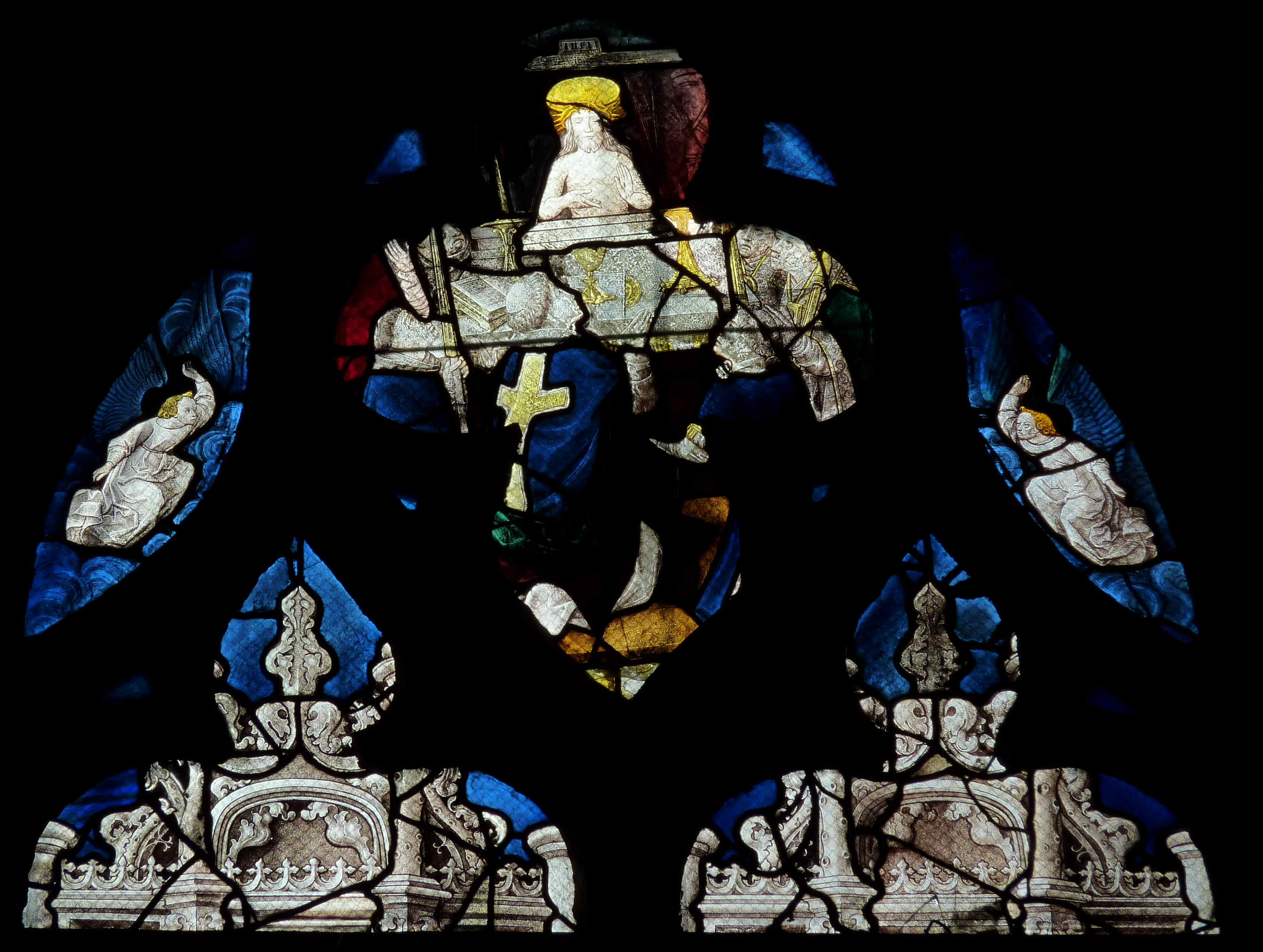 Katholische Kirche Saint-Pierre in Dreux im Département Eure-et-Loir (Centre-Val de Loire/Frankreich), Bleiglasfenster in der Josephskapelle; Darstellung: Szenen aus dem Leben Josephs; Medaillon im Maßwerk aus dem 16. Jahrhundert: Gregorsmesse (Ausschnitt)